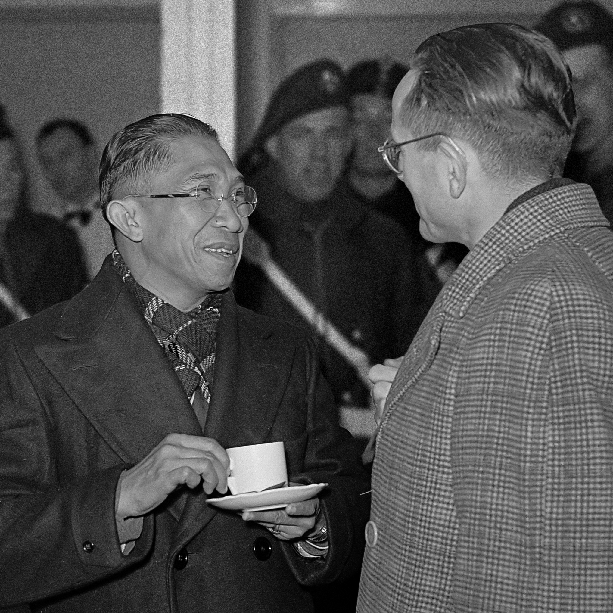 Aankomst Soekawati, president van Oost-Indonesië 28 januari 1947